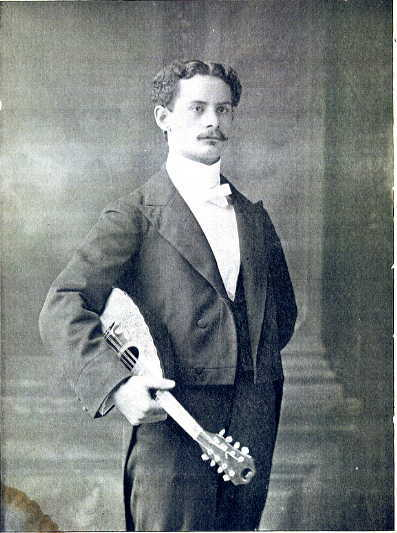 Il compositore e musicista Isernino Giuseppe Pettine in una foto del 1898.